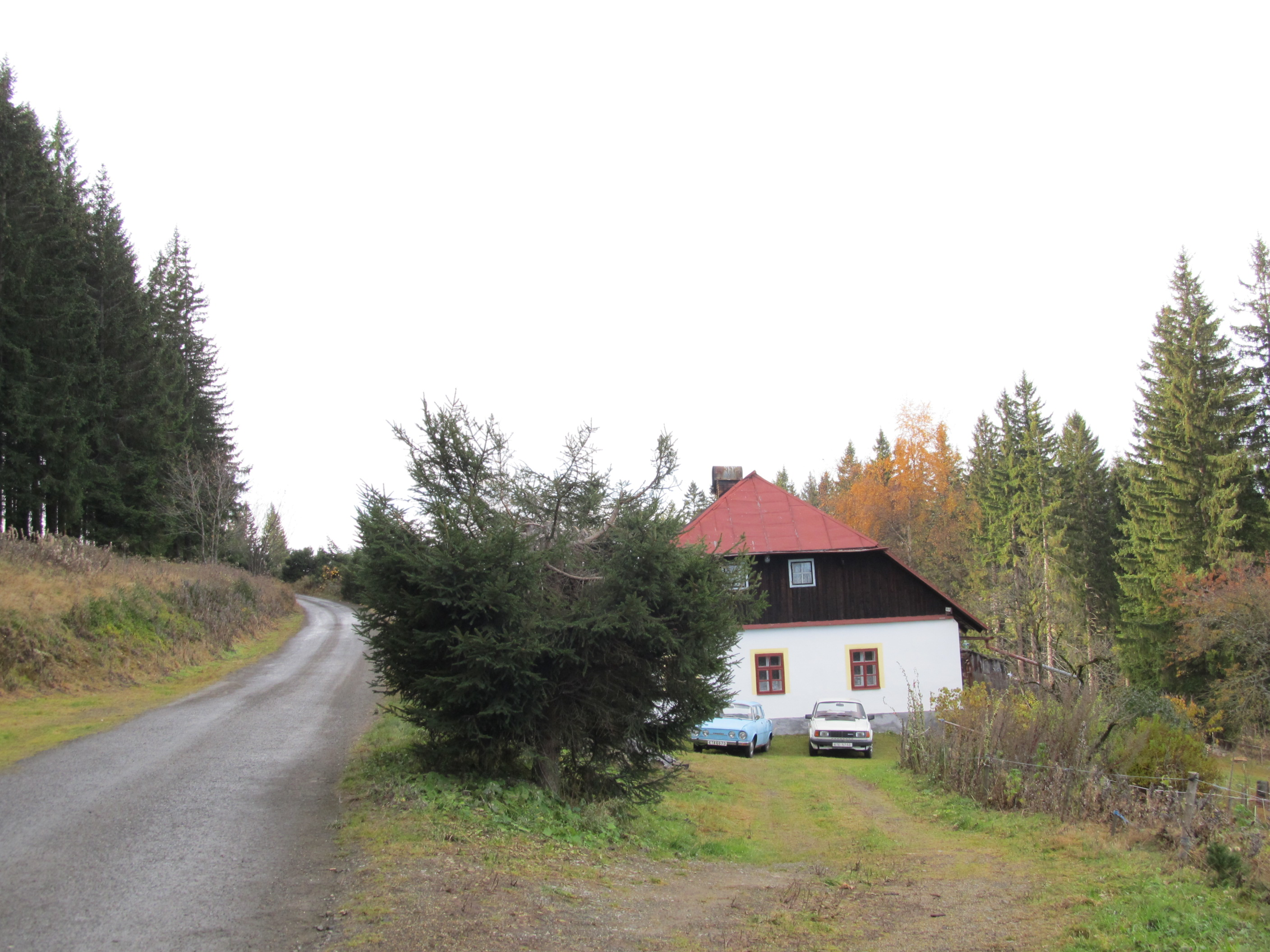 Horní Kochánov